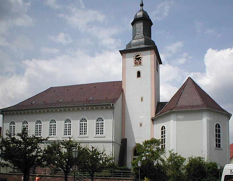 Evangelische Kirche in Aglasterhausen, Schiffe von 1806/07